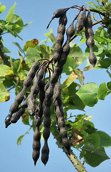 Indian Coral Tree Erythrina variegata in Kolkata, West Bengal, India.